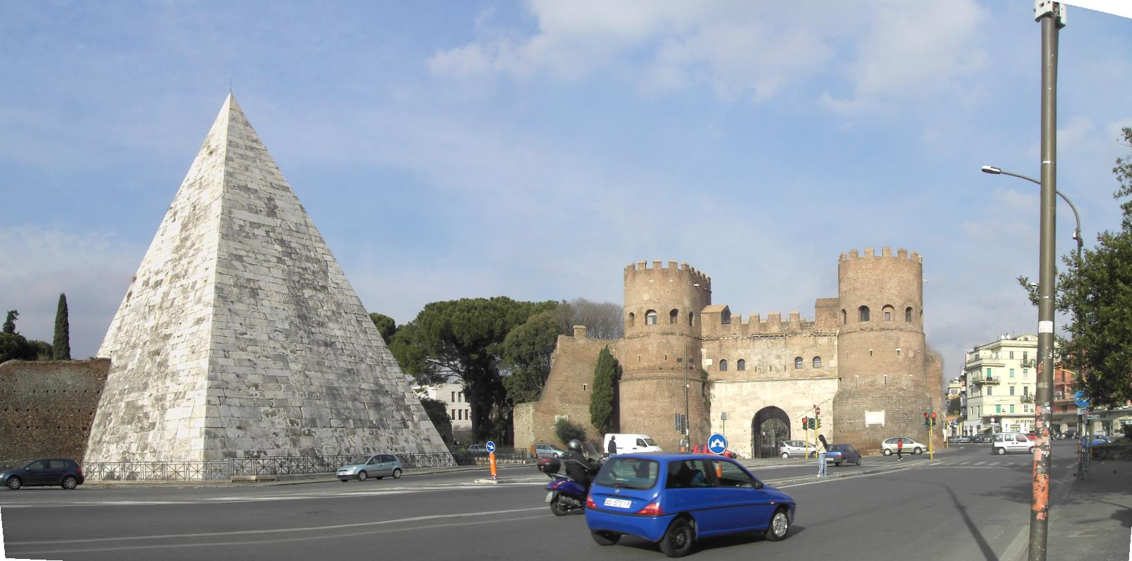 Roma, Porta San Paolo e la Piramide di Caio Cestio. 1870s. 2006.